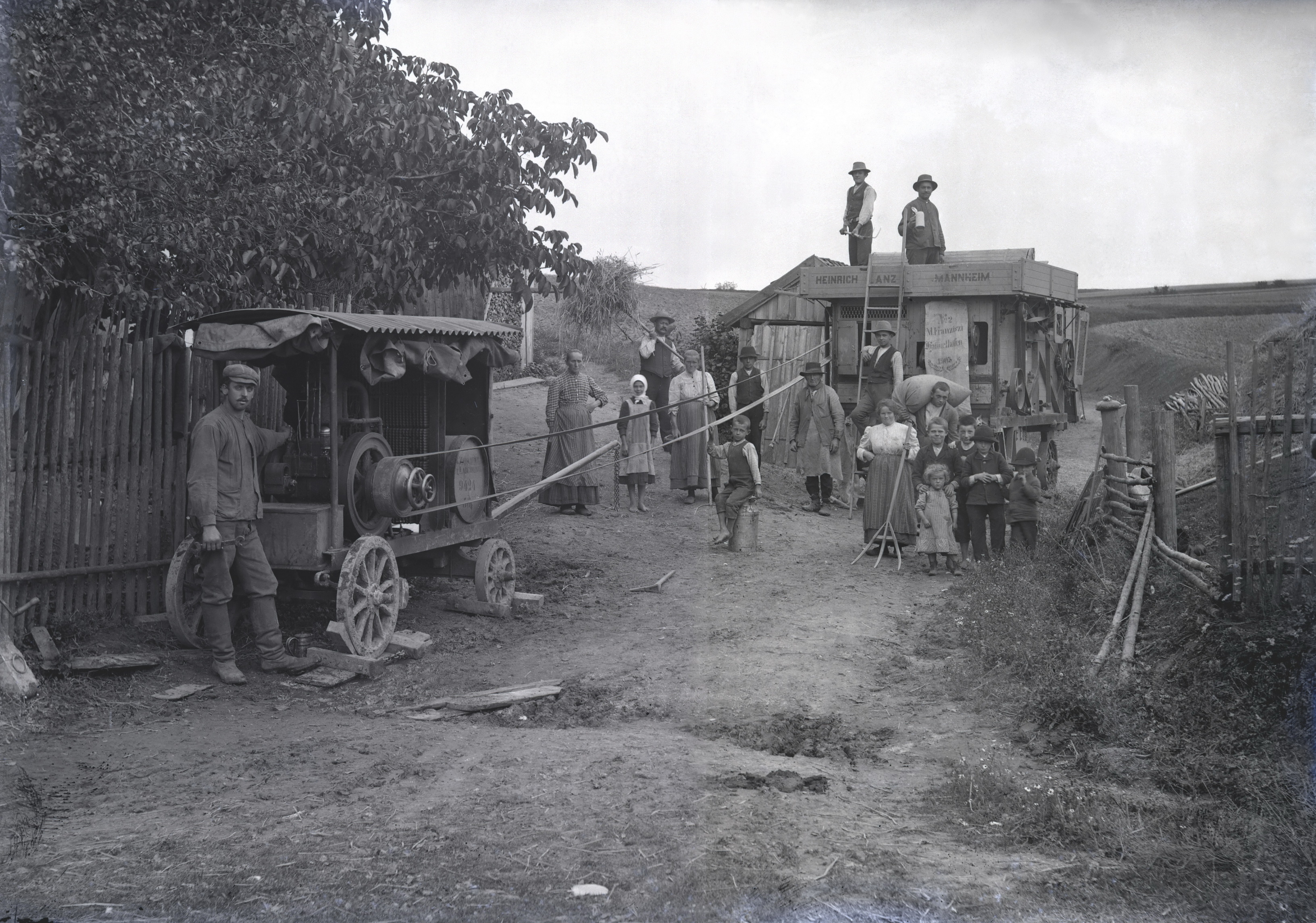 Laberweinting, Haimelkofen. Das Bild zeit Drescharbeiten beim Kleinbauern und Bader Michael Franziszi. Es kommt eine Dreschmaschine von Heinrich Lanz zum Einsatz, die von einem Benzinmotor mit langem Flachriemen angetrieben wird. Da die Hofstelle zu klein war, wurde die Maschine in einem Hohlweg zwischen Hofkirchen und Haimelkofen aufgebaut.